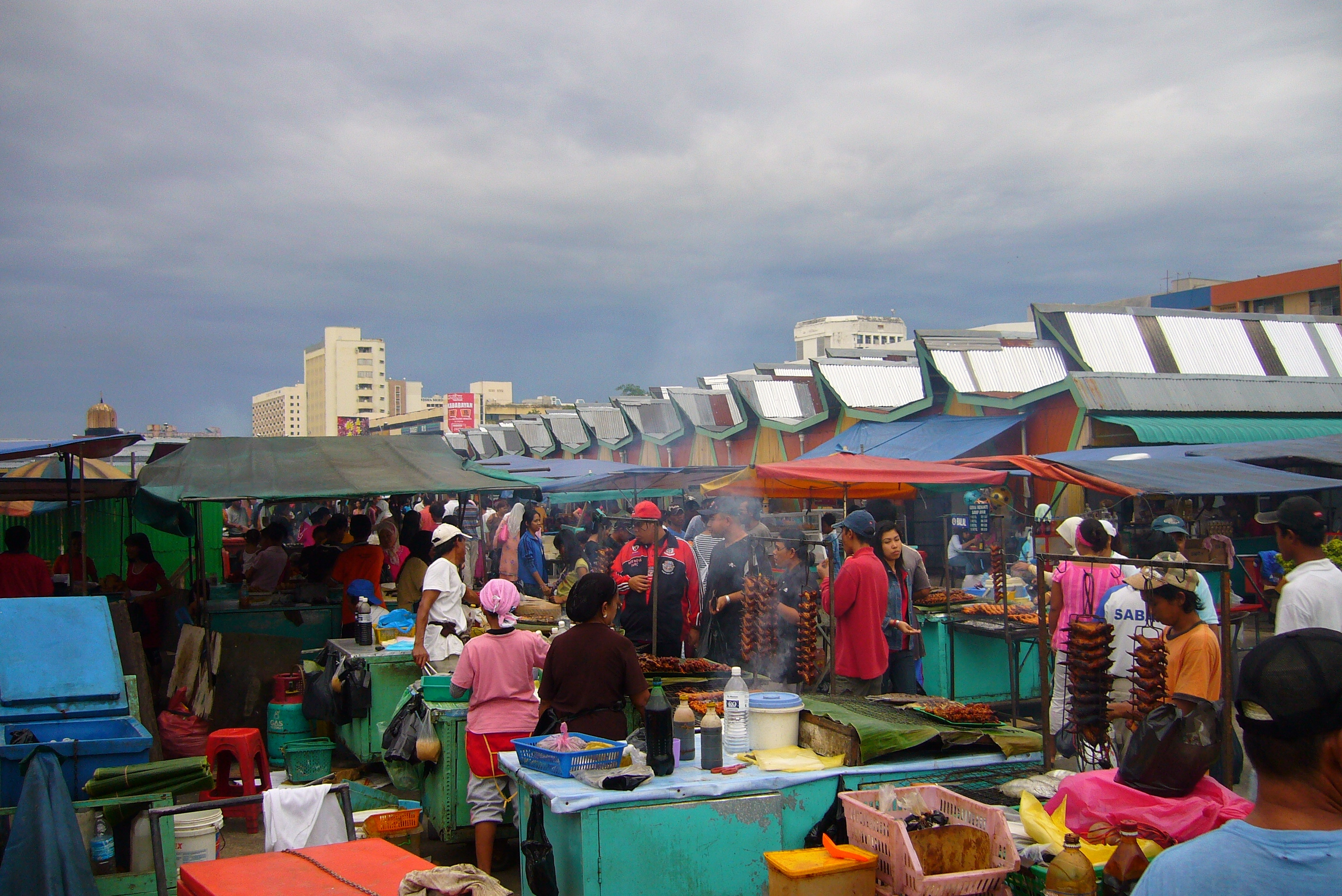 Filipino Market, Kota Kinabalu, Sabah, Malaysia, Borneo